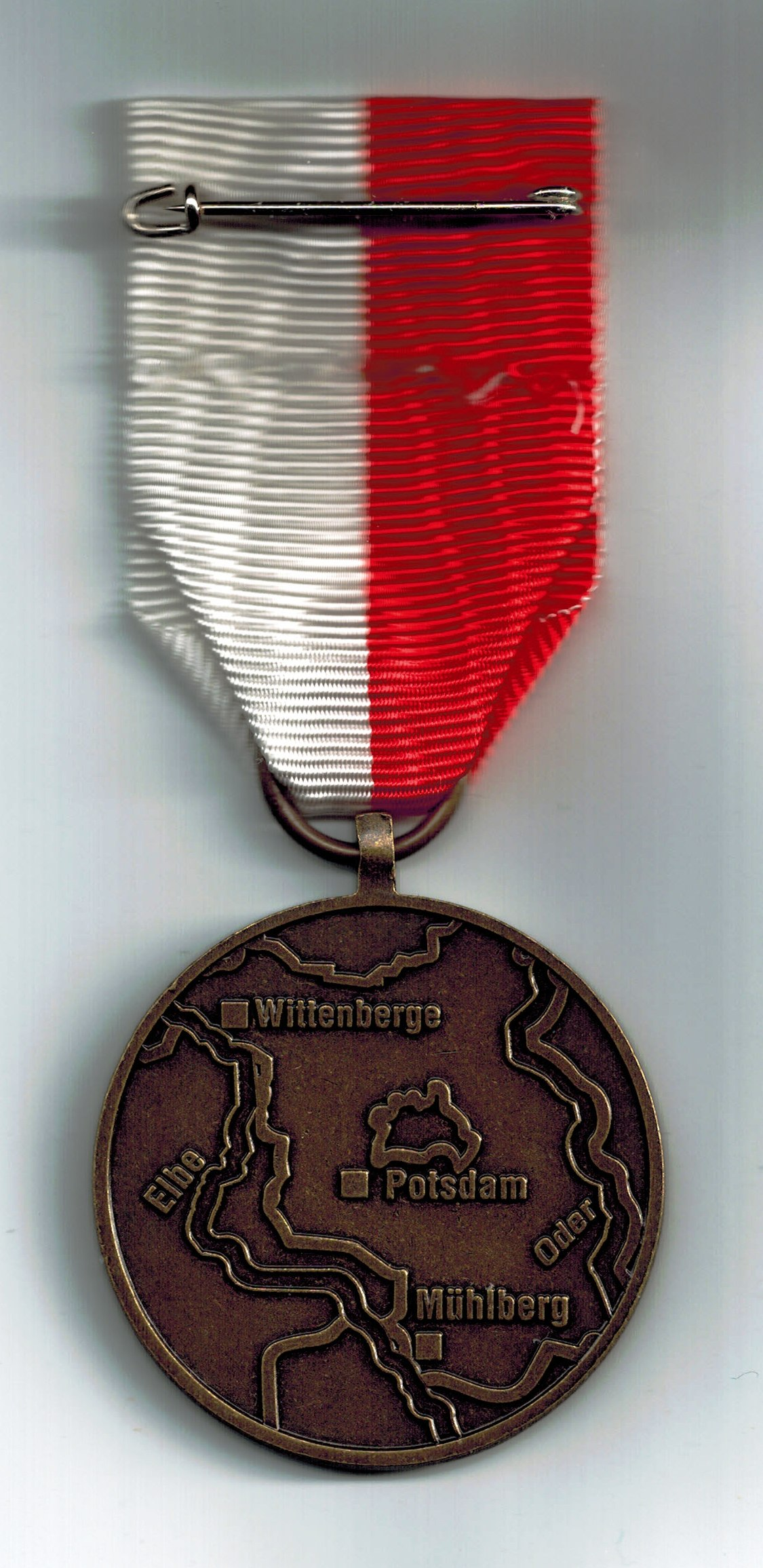 Brandenburgische Hochwassermedaille 2013, Rückseite